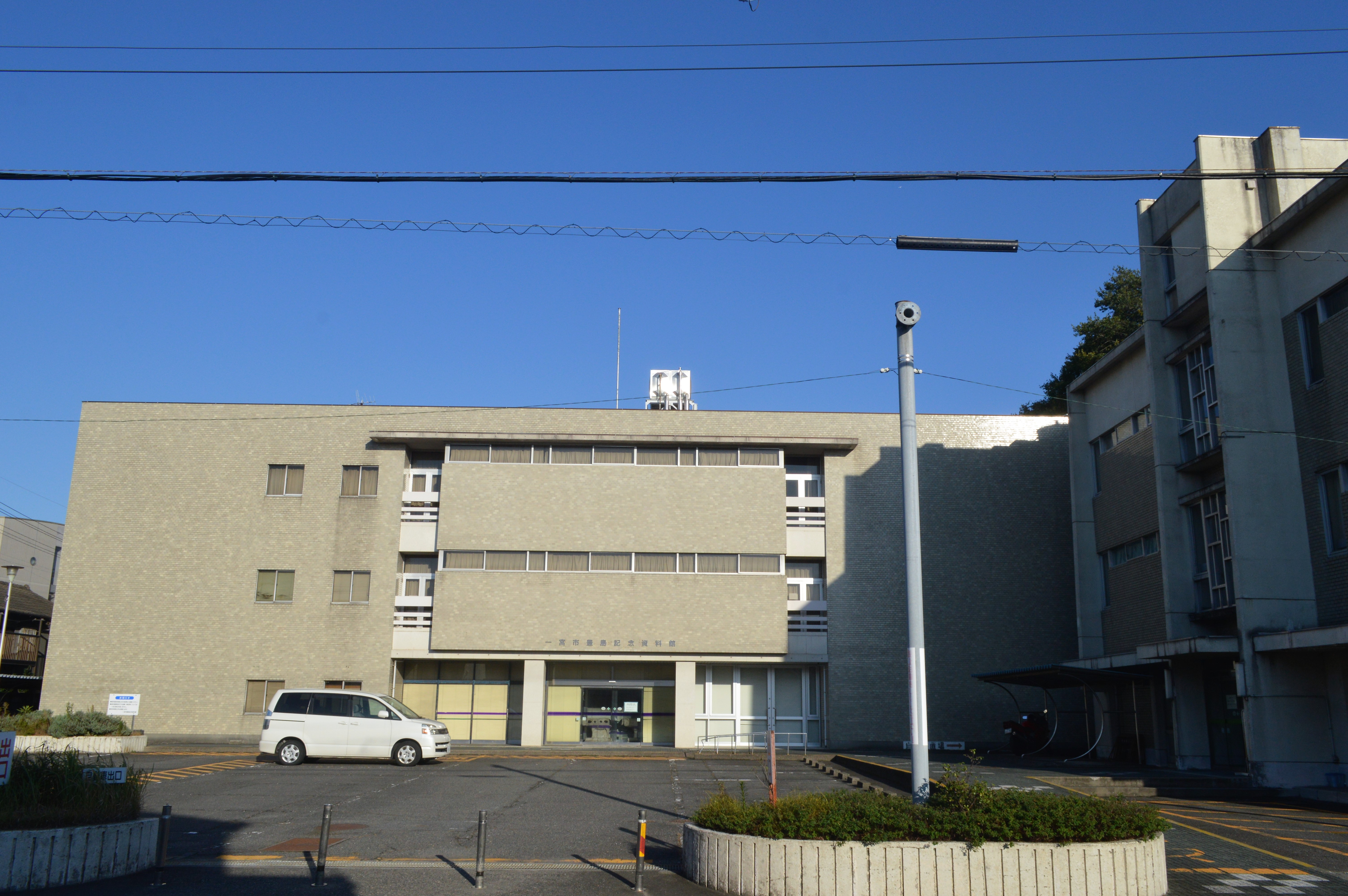 愛知県一宮市の一宮市博物館豊島記念資料館（旧・一宮市立豊島図書館）。